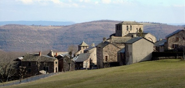 Le village de Castelnau-Pégayrols